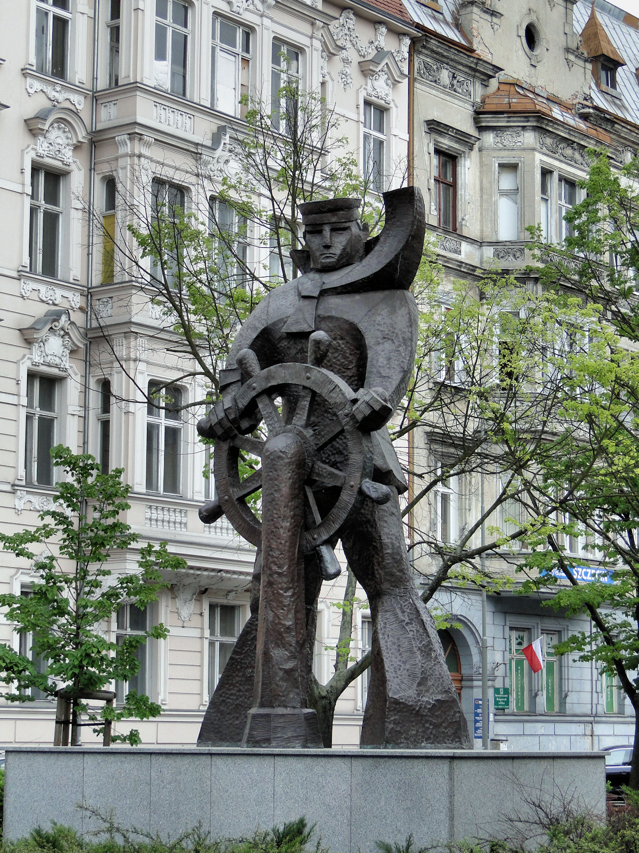 "Marynarz" - rzeźba Ryszarda Chachulskiego przy Placu Grunwaldzkim w Szczecinie